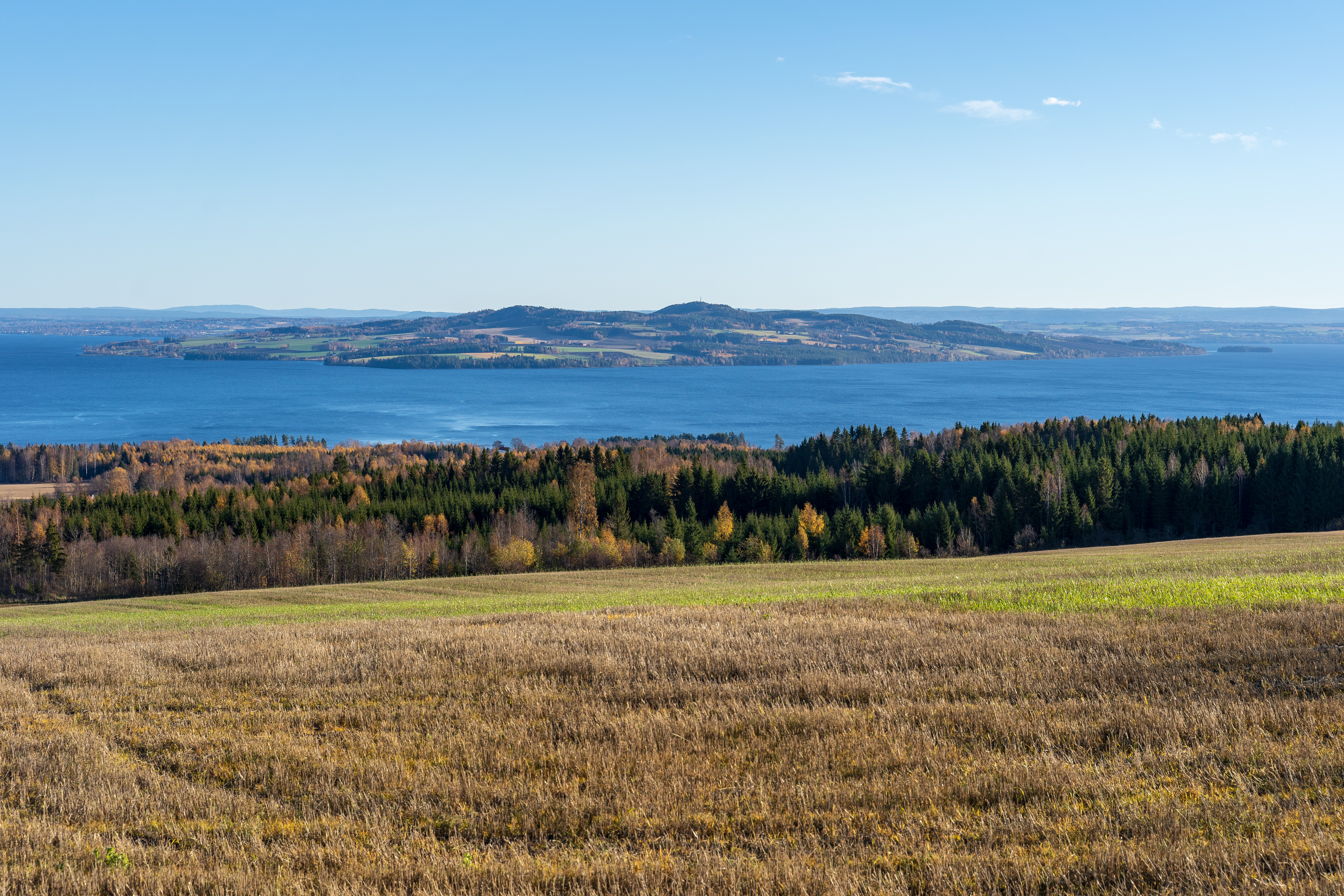 Helgøya sett fra Totenplatået. See profile for usage.